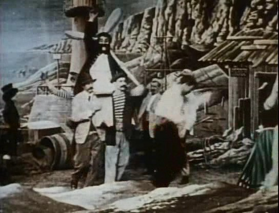 Méliès, Le voyage a travers l'impossible1904 colorizée 34